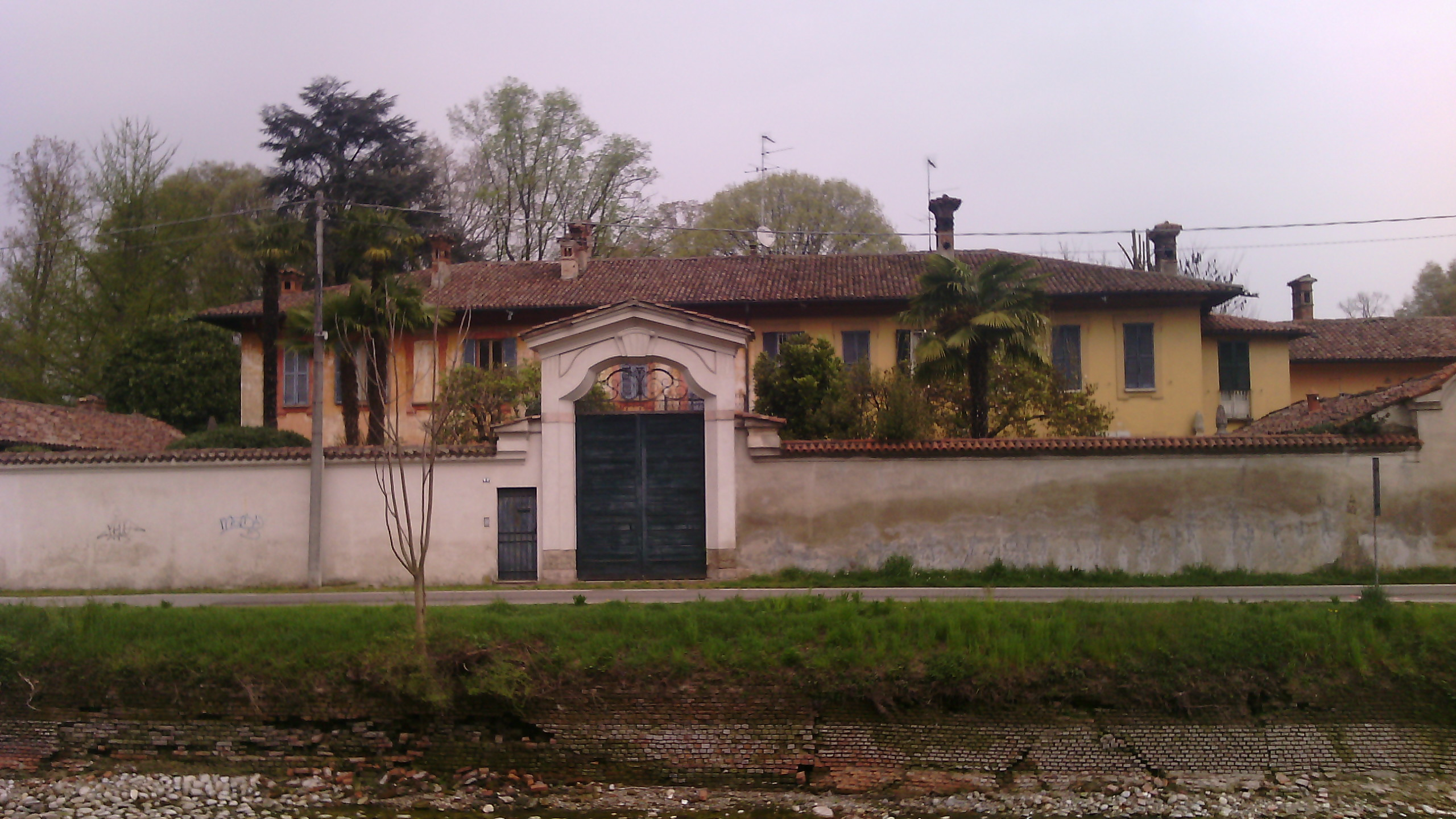 Palazzo Krentzlin a Cassinetta di Lugagnano (MI) - Italy